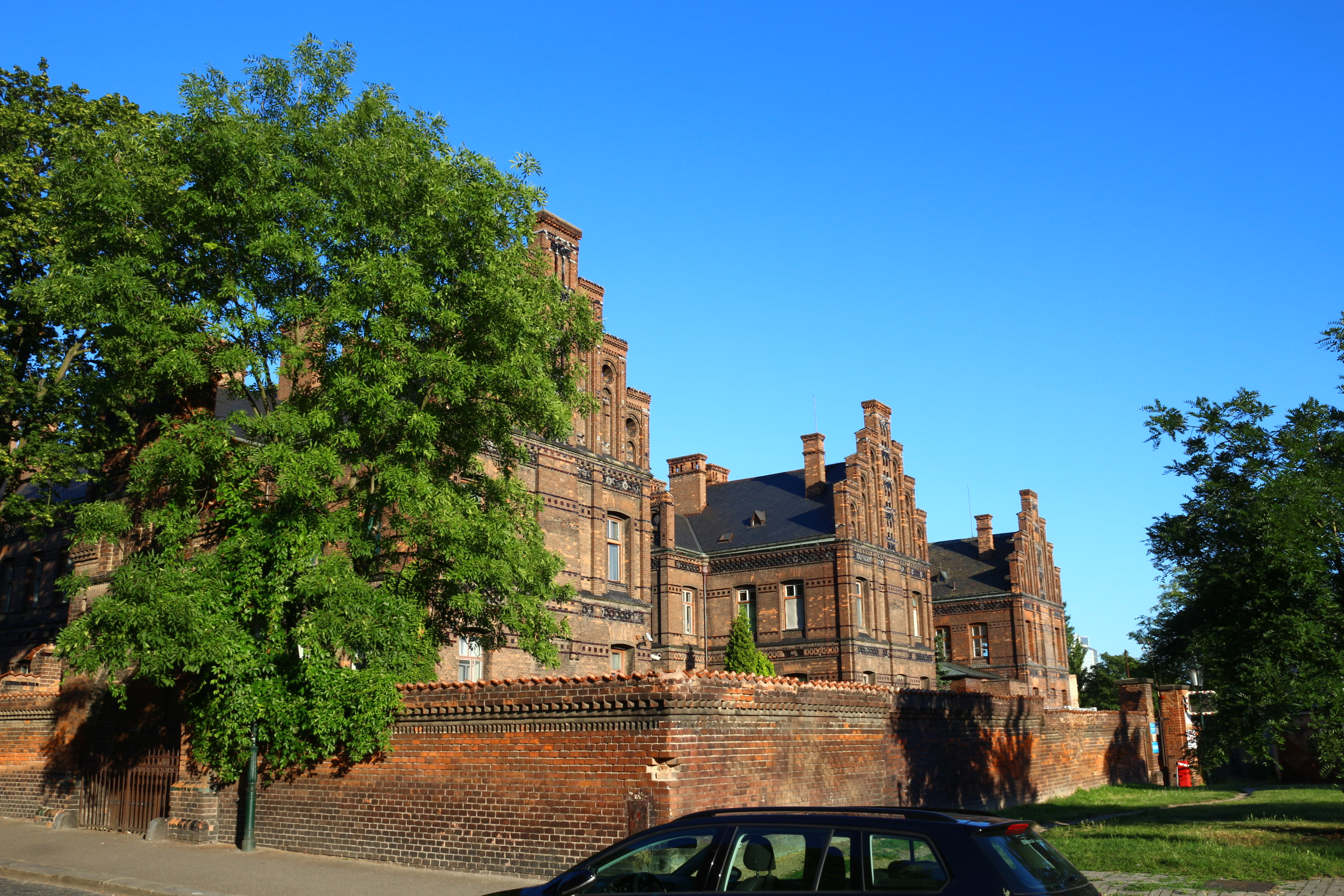 Praha, porodnice u Apolináře